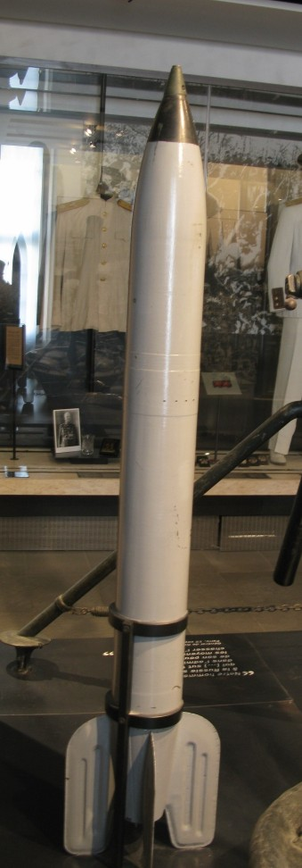 Katyusha rocket.